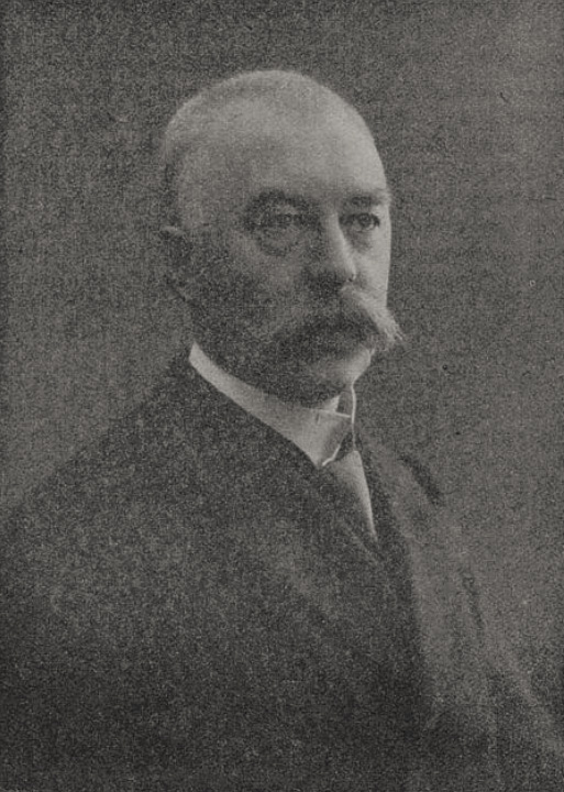 Karl Klingemann, der neue General-Superintendent der Rheinprovinz, bisher Superintendent in Essen. Foto Atelier Fleischhauer, Essen, 1913